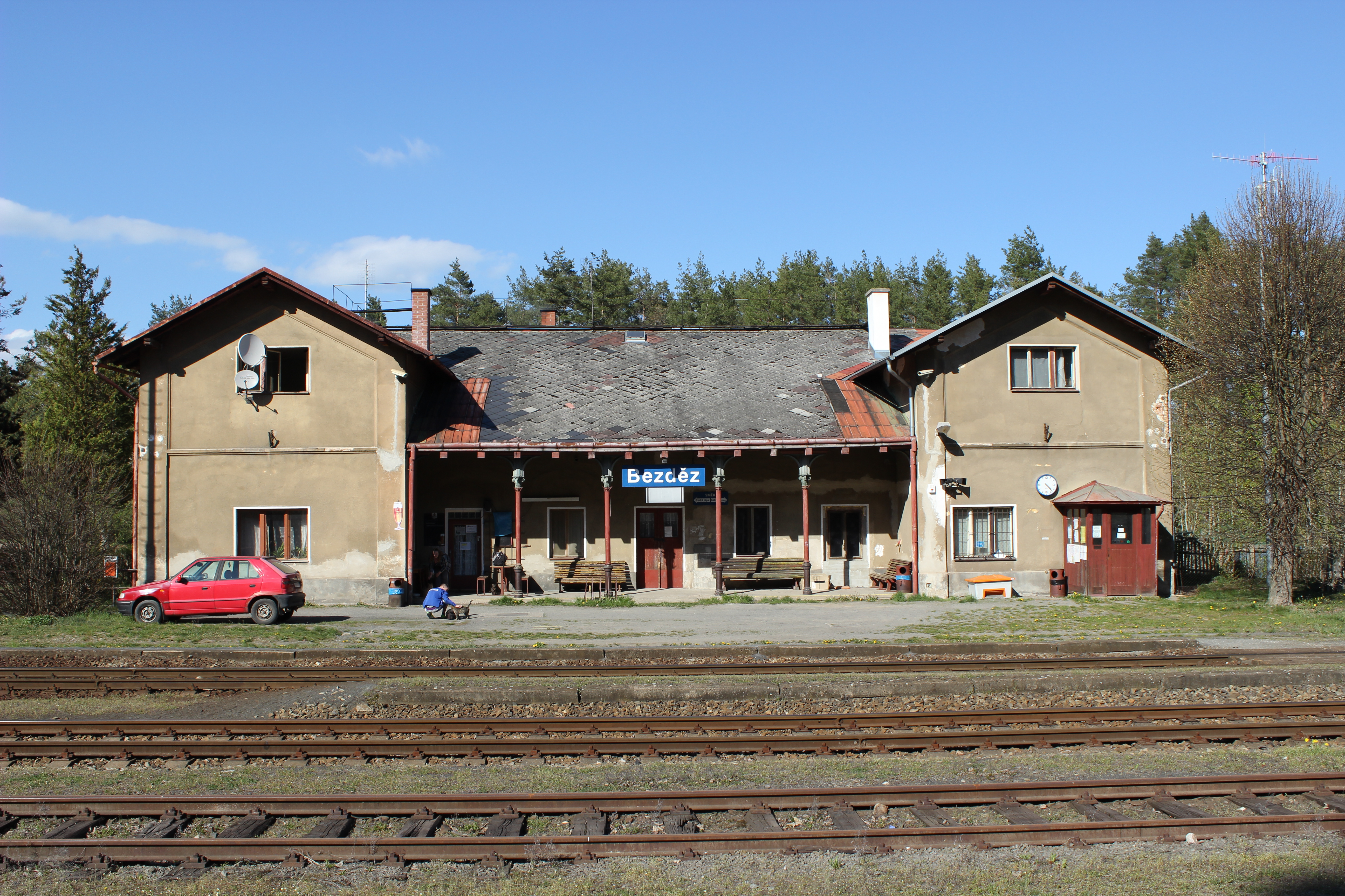 Staniční budova v železniční stanici Bezděz na trati číslo 080 z Bakova nad Jizerou do Jedlové.